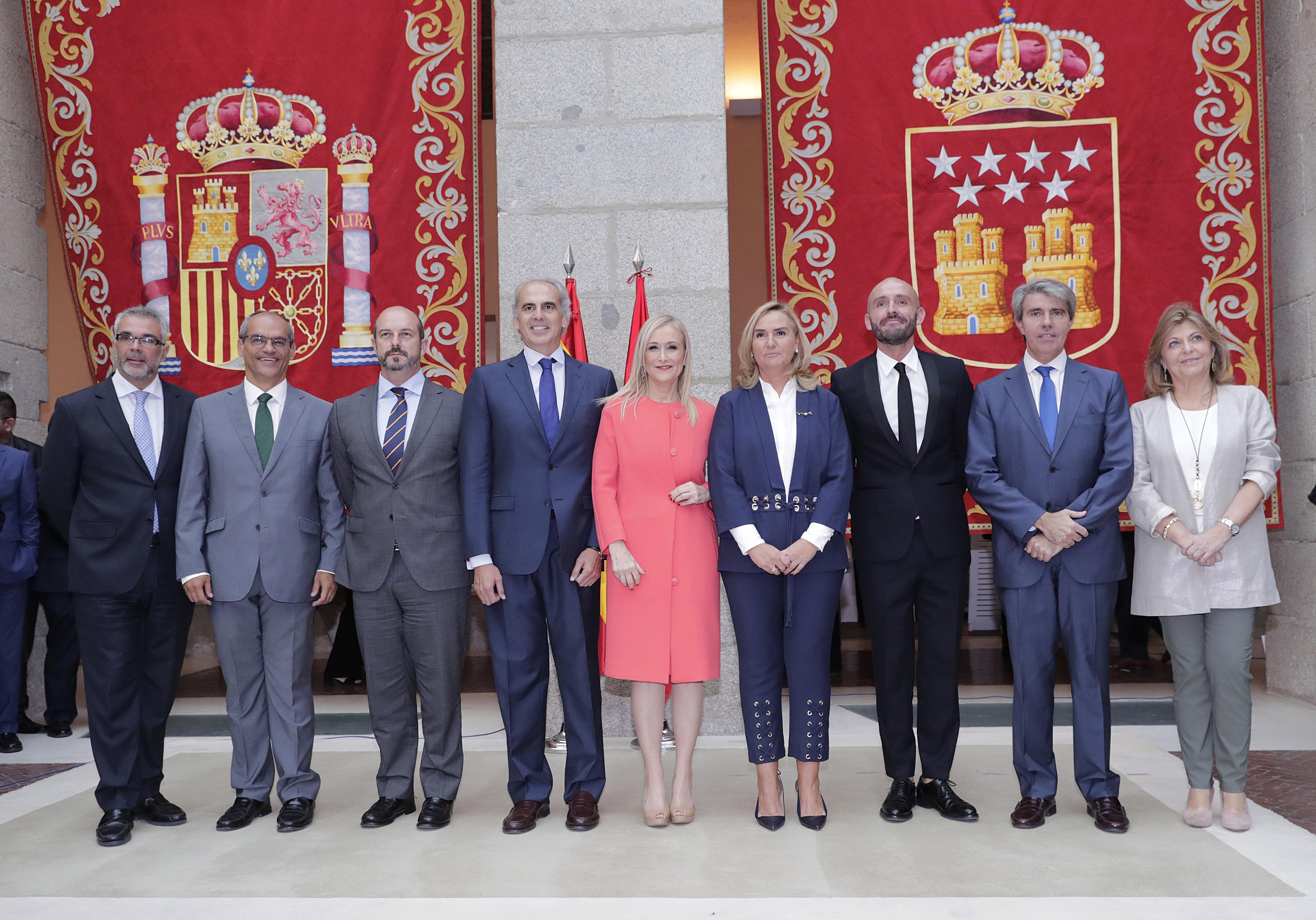 CIFUENTES, EN LA TOMA DE POSESIÓN DE LOS NUEVOS CONSEJEROS DEL GOBIERNO REGIONALLa presidenta de la Comunidad de Madrid, Cristina Cifuentes, preside la toma de posesión de los nuevos consejeros del Gobierno Regional.Foto: D.Sinova